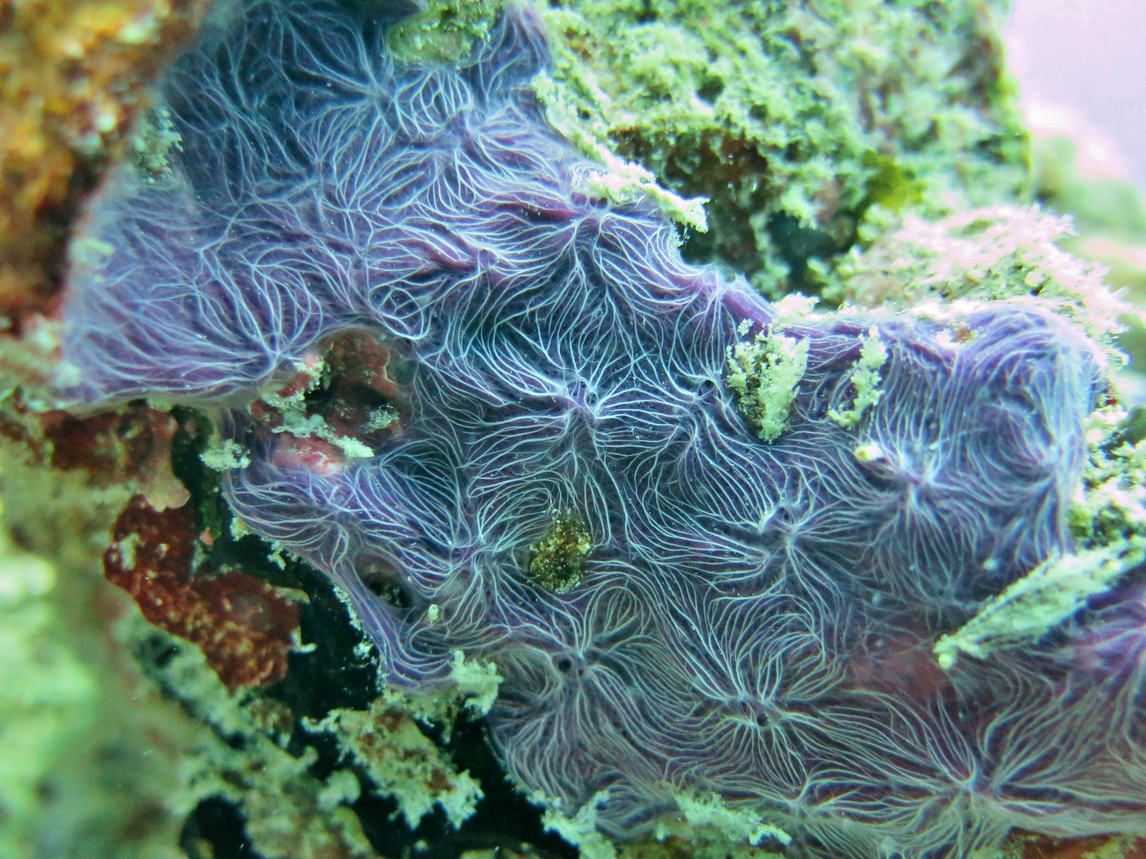 Une éponge Haliclona nematifera aux Maldives (atoll de Baa).